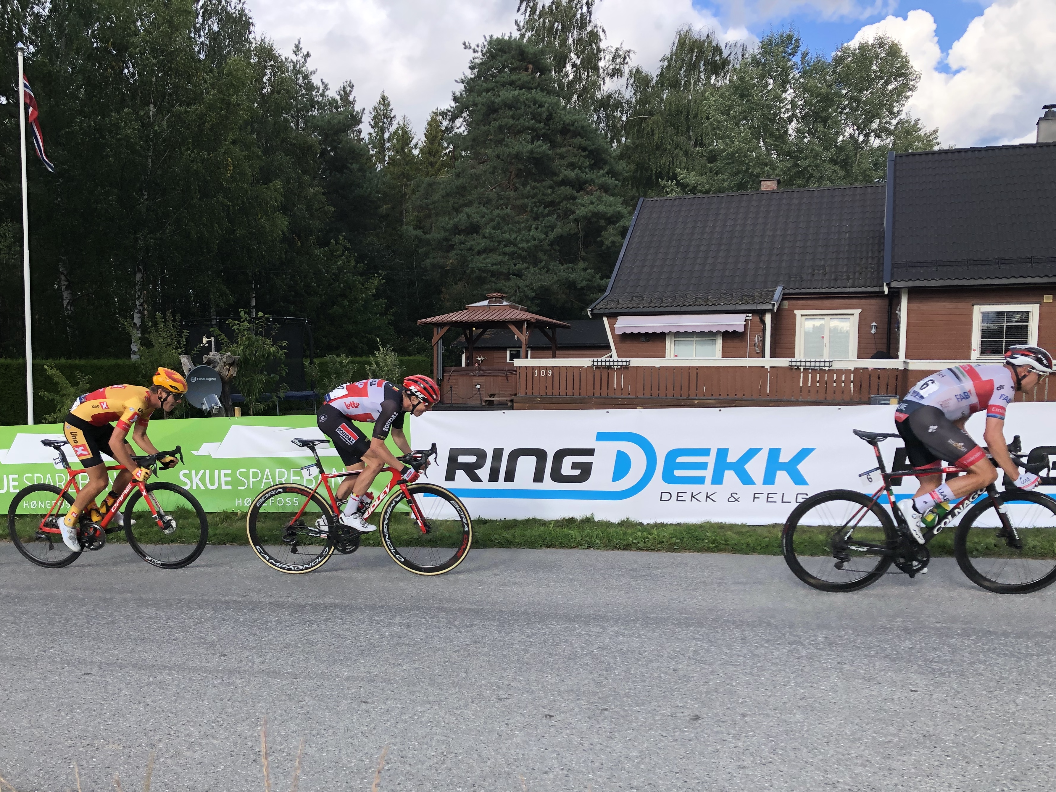 NM landevei fellesstart 2020 Røyse - 6 Alexander Kristoff - 2 Carl Fredrik Hagen - 13 Jonas Iversby Hvideberg